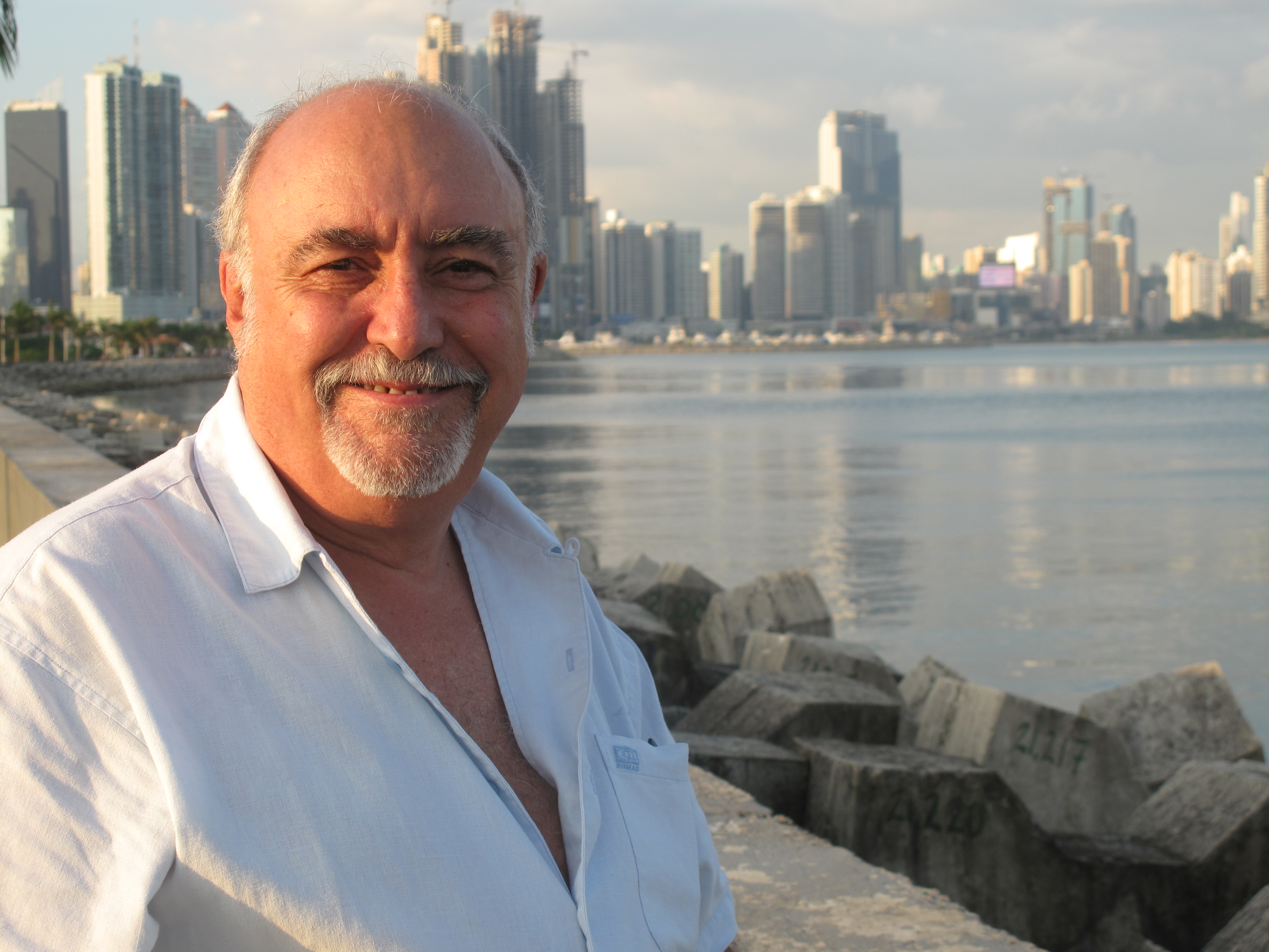 Costanera en 2011